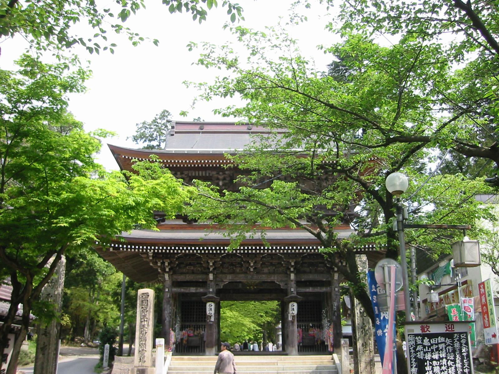 谷汲山華厳寺